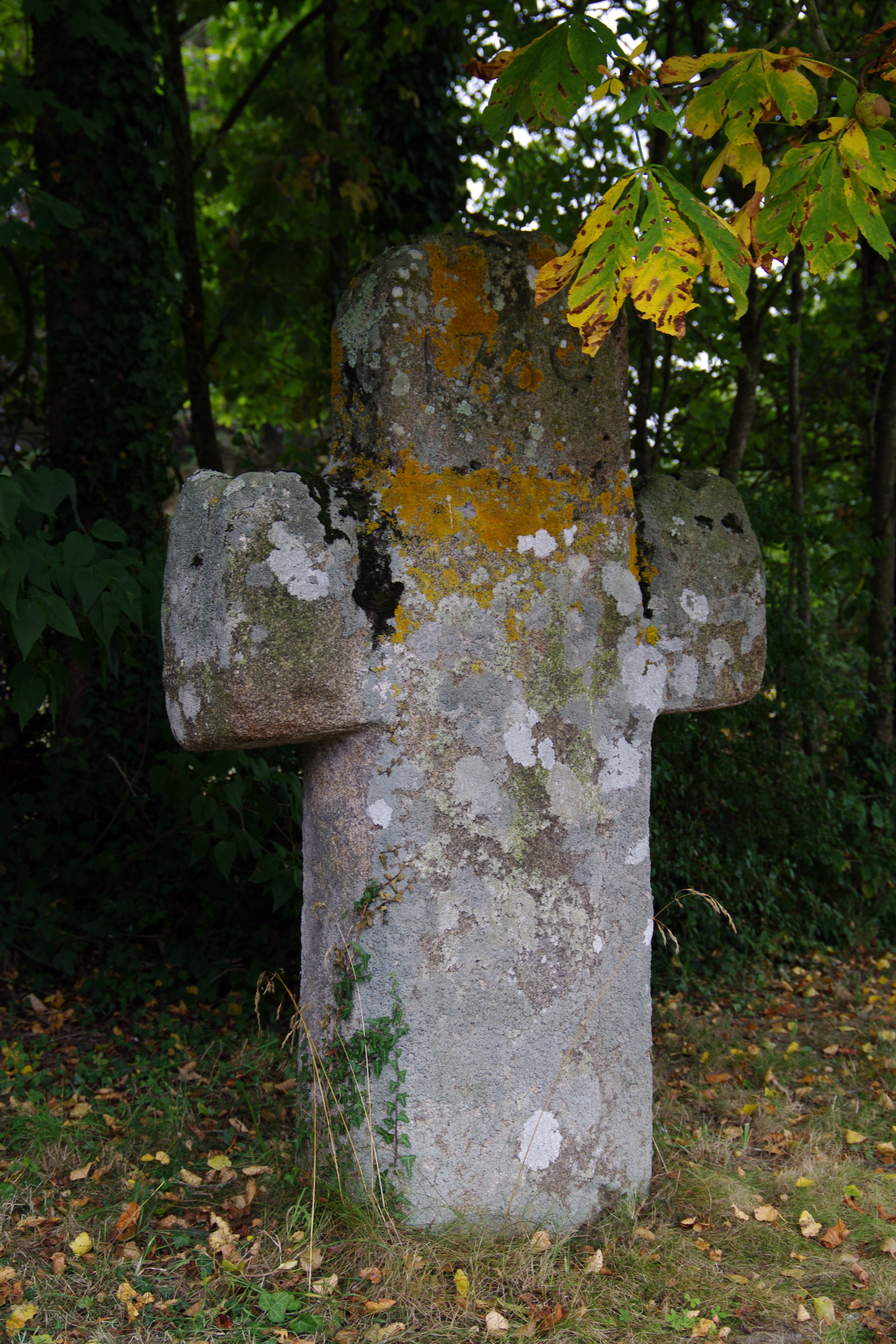 Croix monolithe, (Inscription, 1926) .